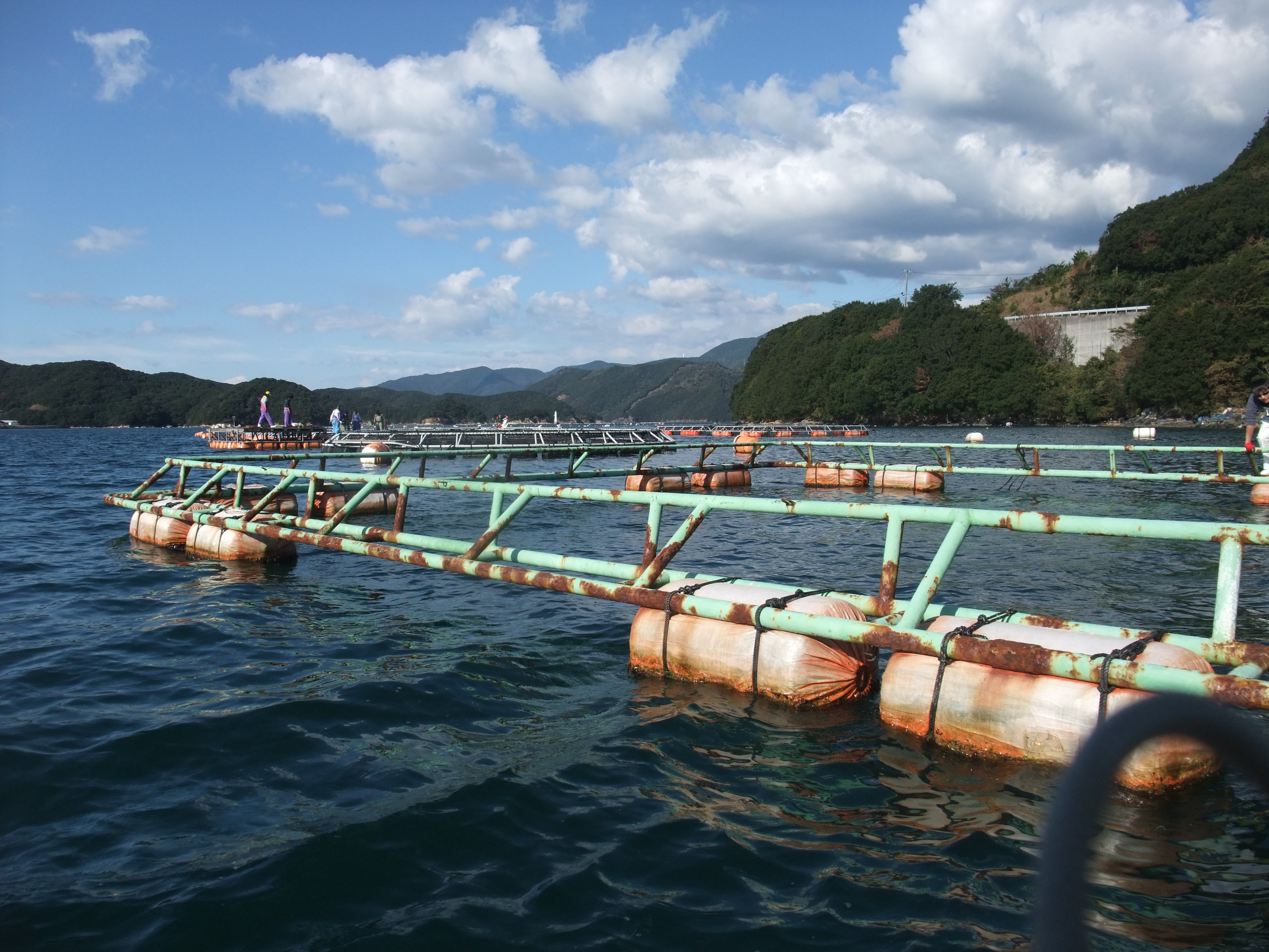 尻貝にある実験用養殖生簀